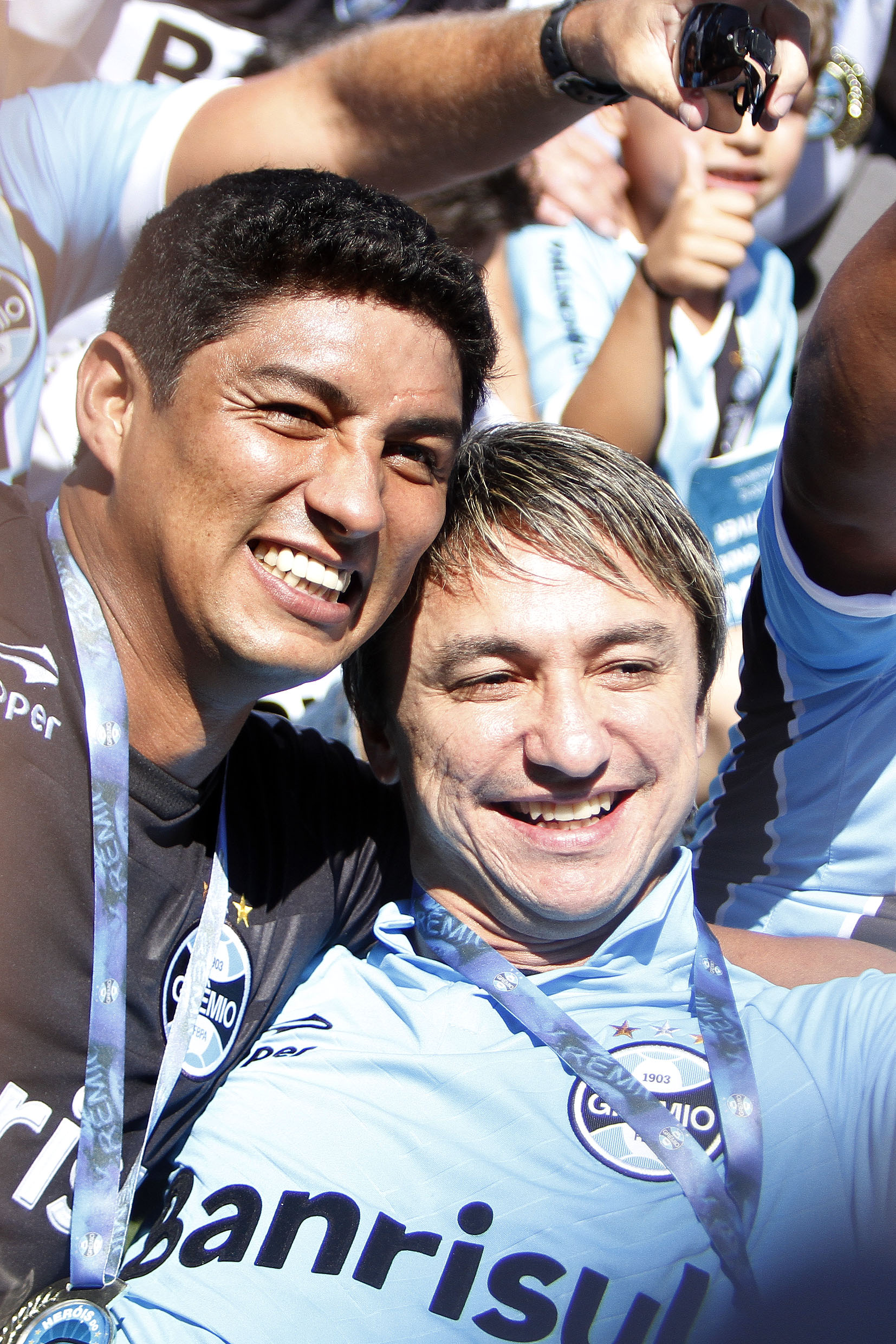 PORTO ALEGRE, RS - FUTEBOL - 02.12.2012 - Jardel e Paulo Nunes durante a homenagem do Grêmio para os seus jogadores antes do GRENAL deste domingo, as 17h, no último jogo do Estádio Olímpico. A equipe tricolor se despede do velho Monumental para jogar na Arena Porto-Alegrense a partir do próximo final de semana, dia 08, numa partida amistosa contra o Hamburgo-ALE. Foto: Guilherme Testa